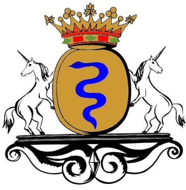 Blason de la famille Colbert et de la commune de Croissy-Beaubourg dans le département de la Seine-et-Marne, France. Blasonnement : D’or, à une couleuvre ondoyante en pal d’azur. Couronne : de marquis. Supports : deux licornes regardantes, au naturel. Devise : « Servat et Abstinet »